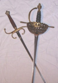 rapier en maingauche